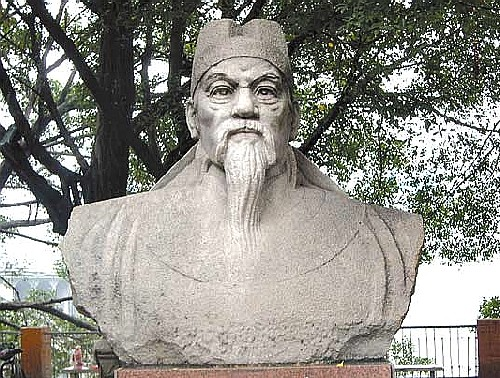 位於韶关市东提路河滨公园的张九龄石像。